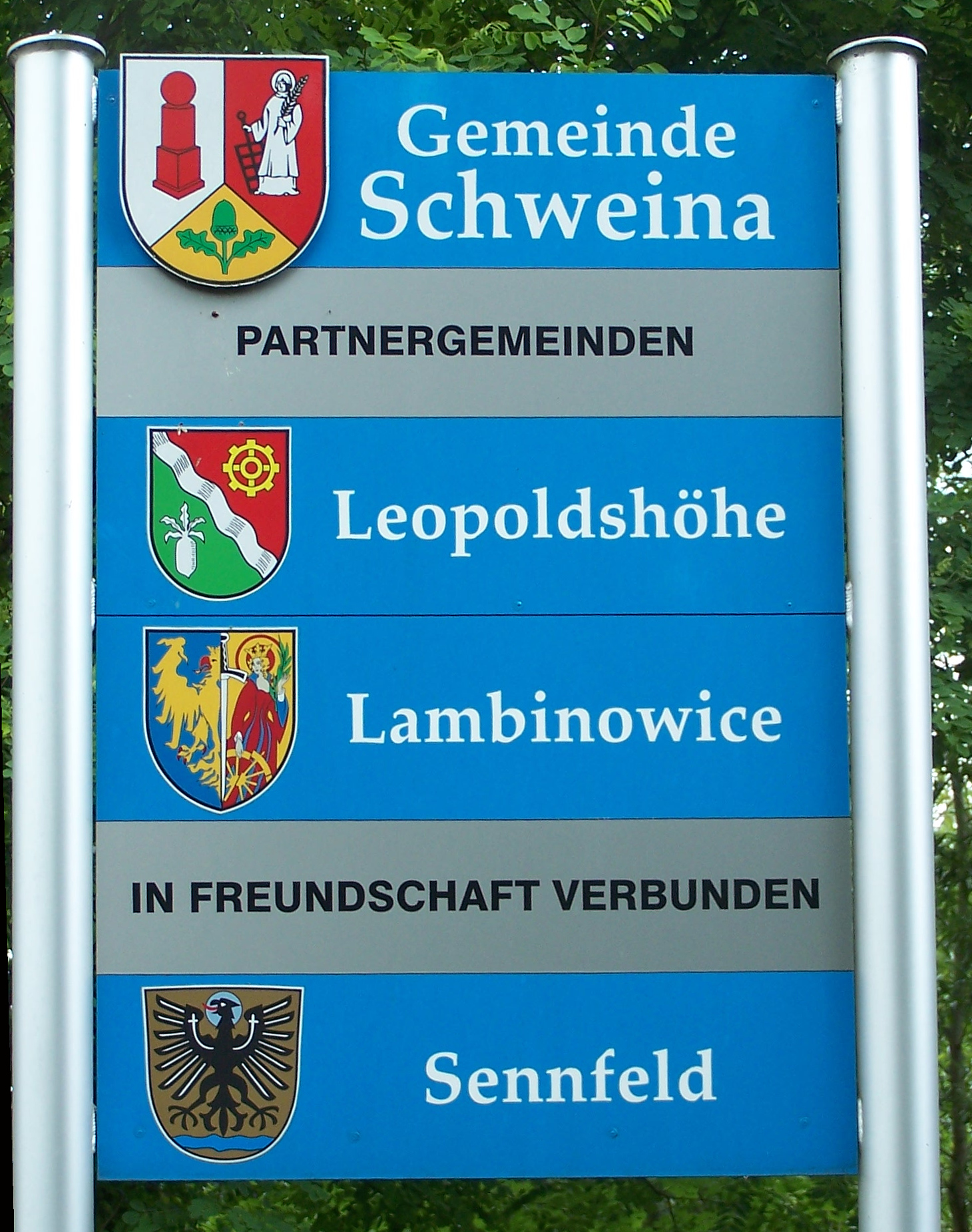 Schweina